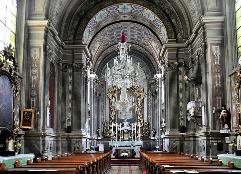 Innenansicht